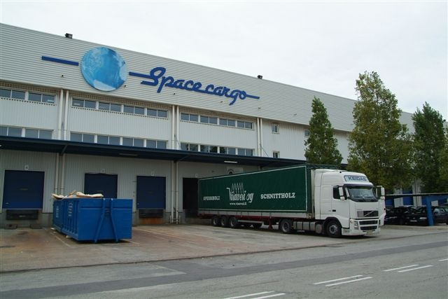 Space Cargo, carrer Artic 132-134, ZAL, 08040 Barcelona